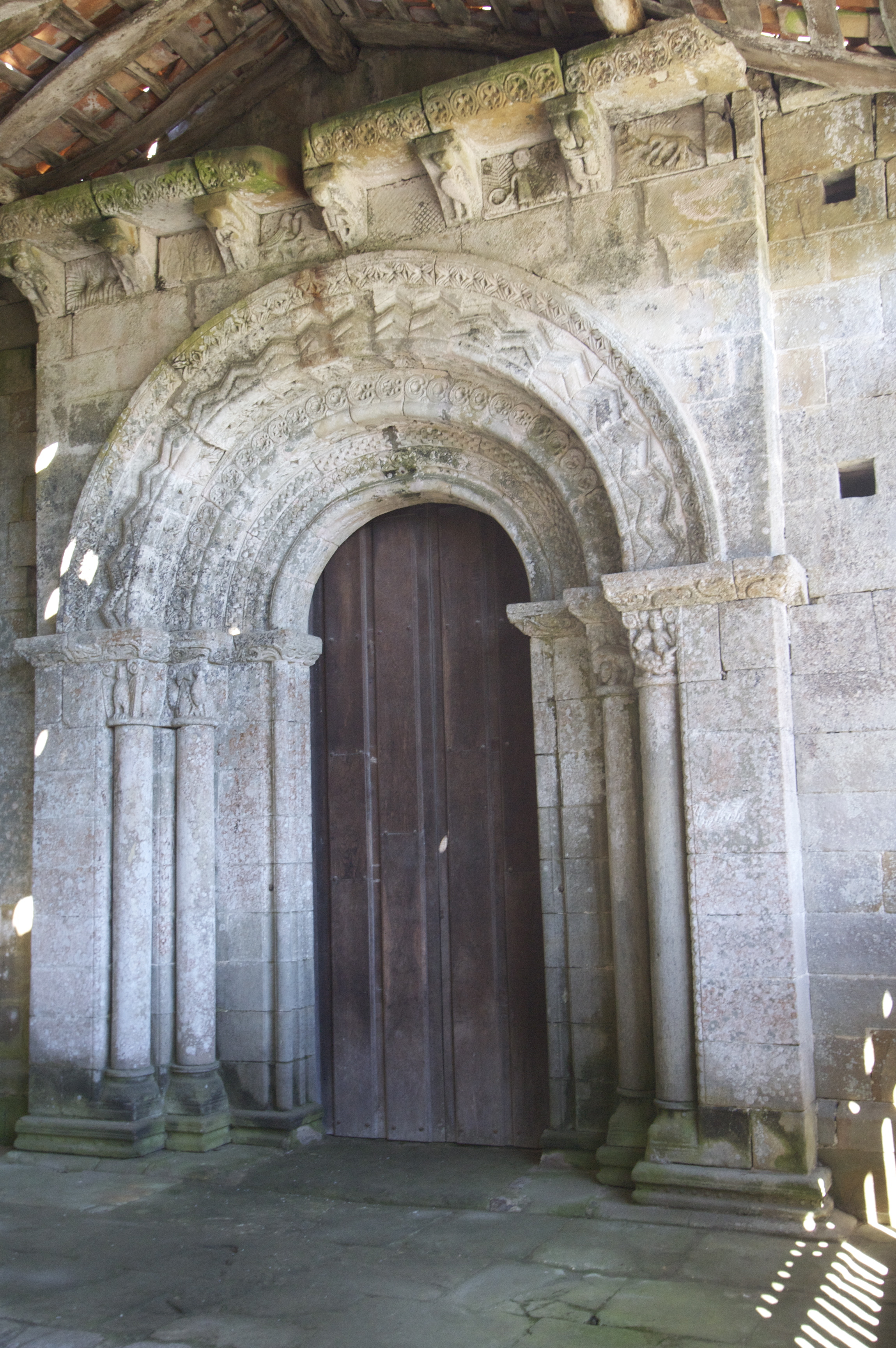 Puerta principal de la iglesia románica de Santa María, La Lloraza, Villaviciosa, Asturias.